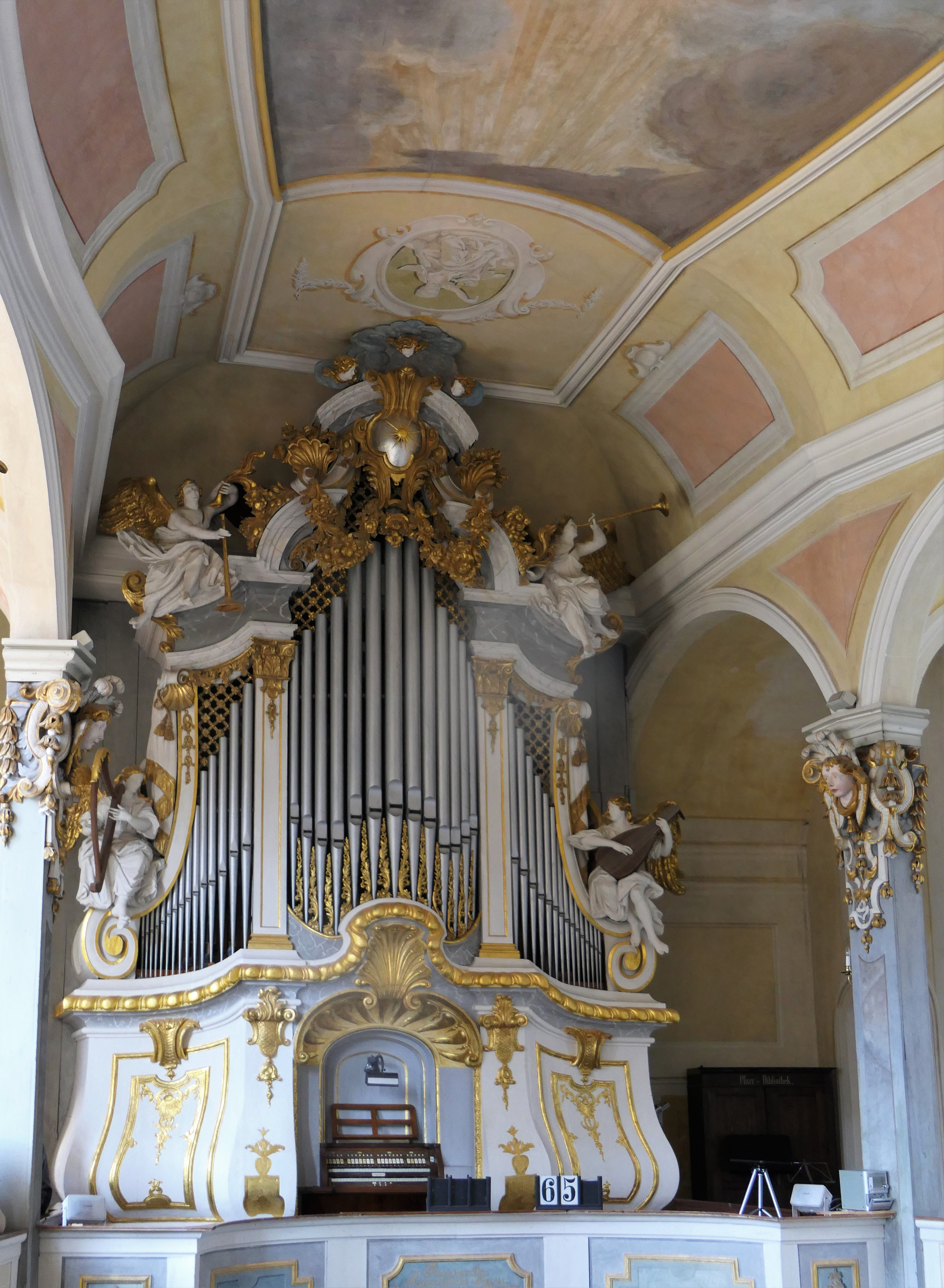 Orgel in der Schloßkapelle Weesenstein